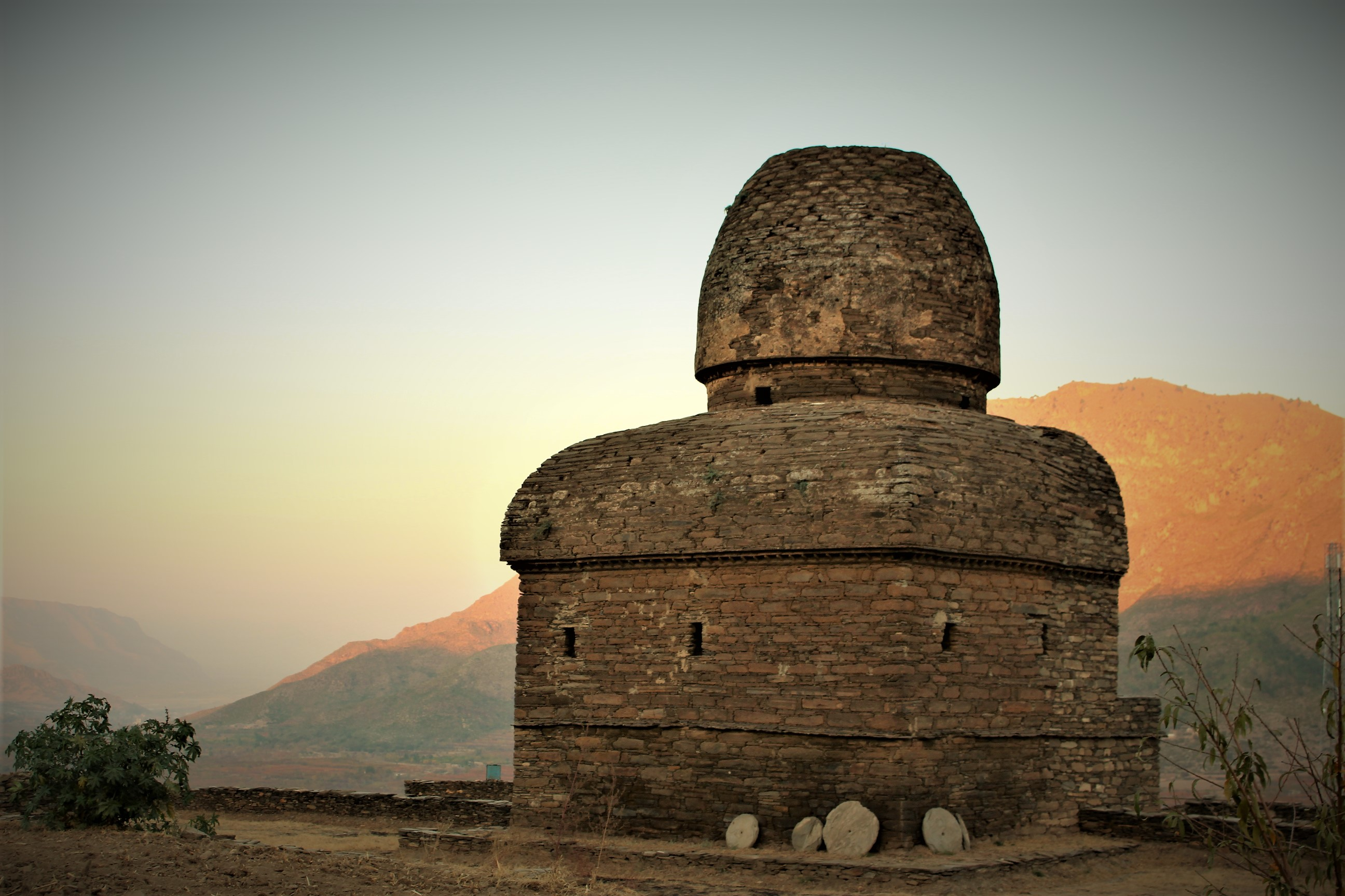 بلوکلے سوات میں 1800 سال قدیم ایک وہاڑا۔ اس وہاڑے کو اٹالین آرکیالوجیکل مشن نے دریافت کیا۔ اس کی گنبد اور دیواریں 18 صدیاں گزرنے کے باوجود صحیح سلامت ہیں۔ یہ گاؤں سوات کے تحصیل بریکوٹ میں بلوکلے کے نام سے واقع ہے۔